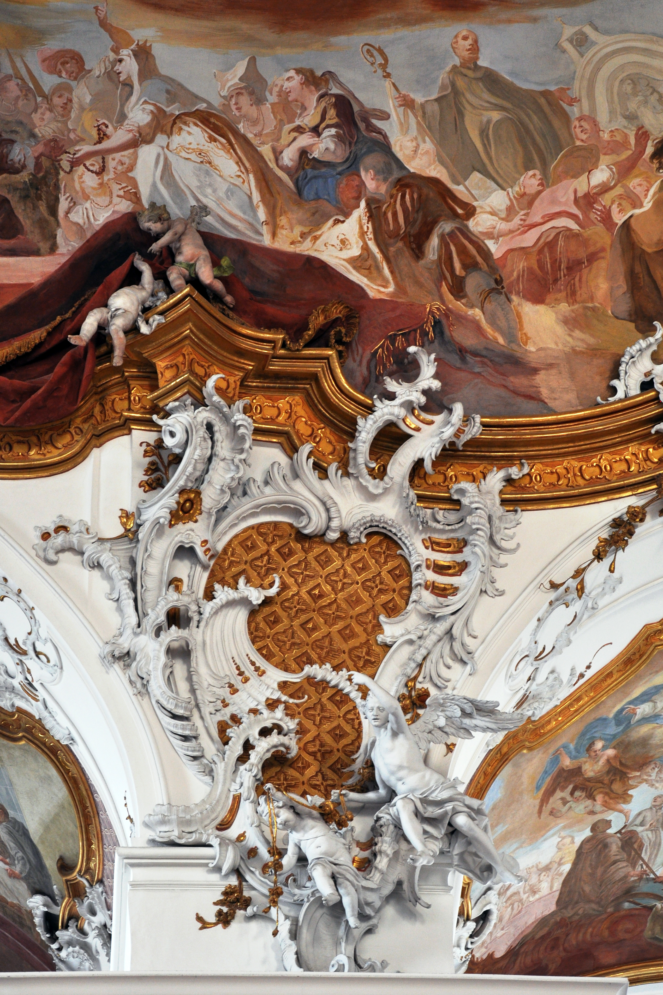 L'église de l'abbaye de Zwiefalten, détail du décor.